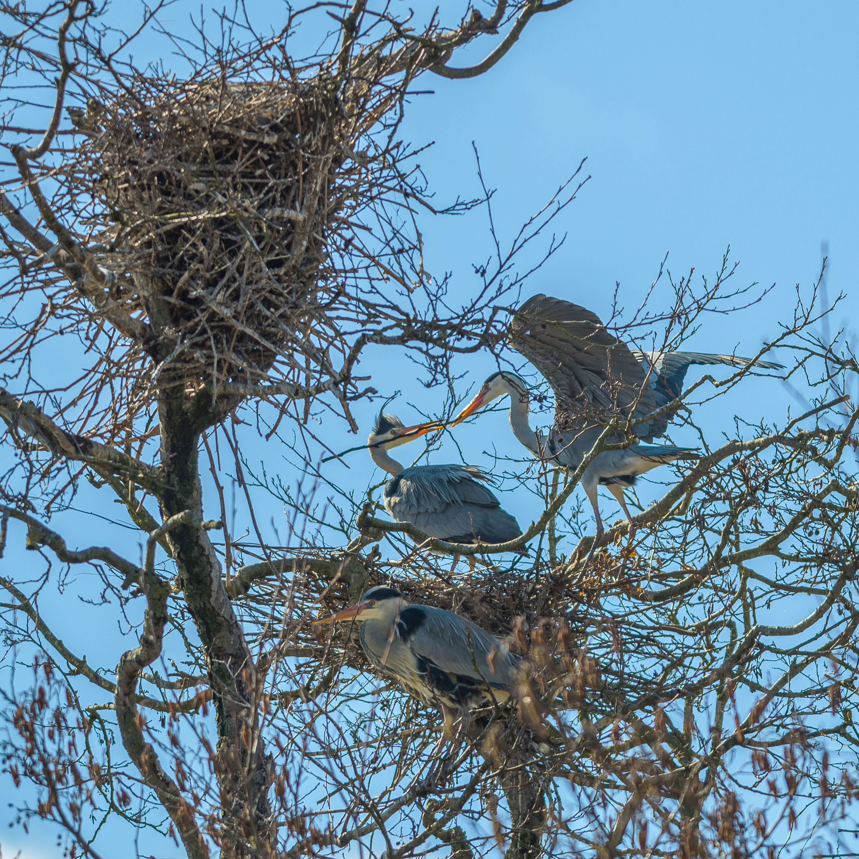 Gråhäger, Grey heron, Ardea cinerea, Djurgården, Stockholm, Sweden